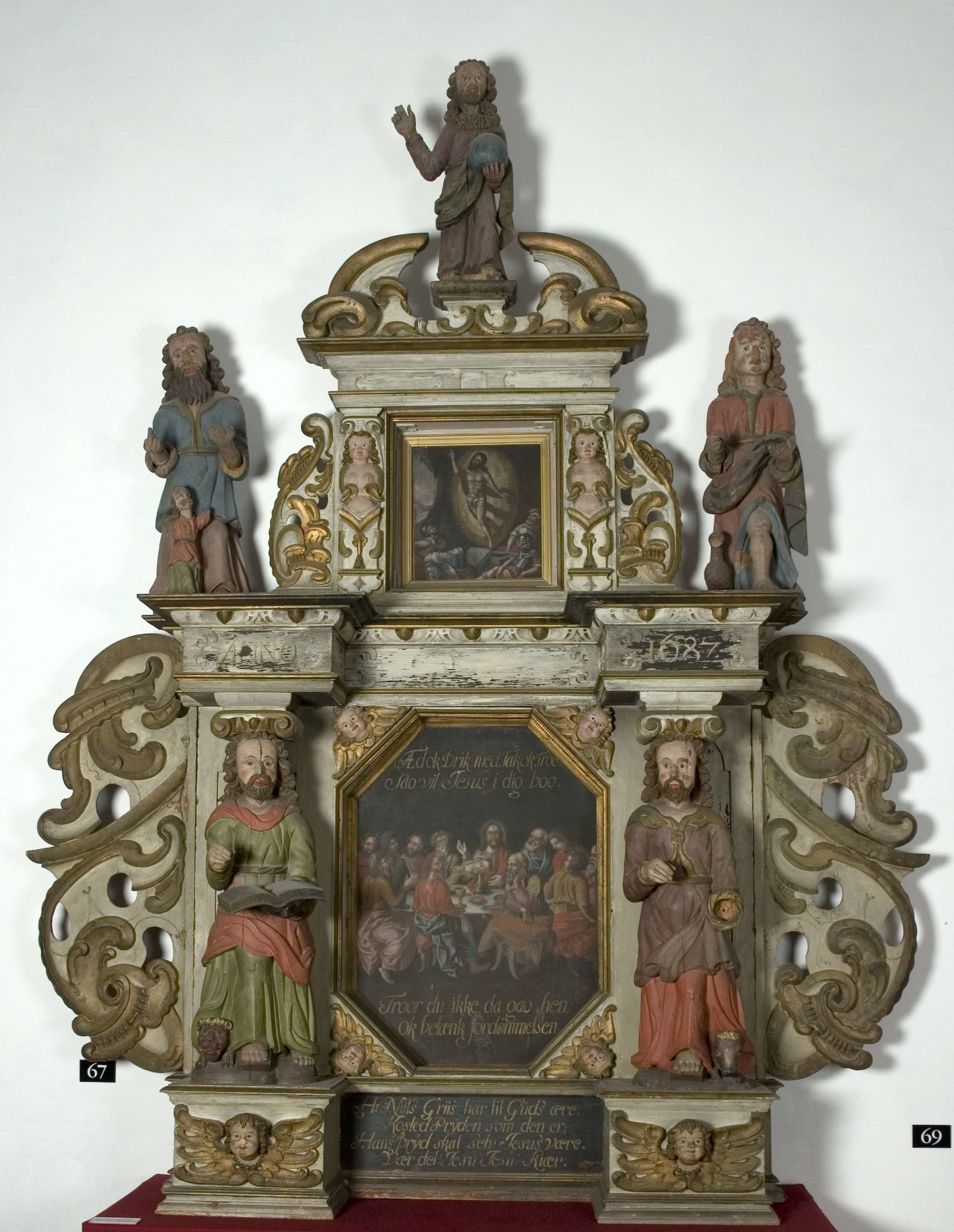 Altertavle (1653) fra gamle Holmen kirke på Prestfoss i Sigdal. Tilskrevet Christopher Ridder. Foto: Anne Lise Reinsfelt. Fra Norsk folkemuseums fotosamling i Digitalt museum. Inventarnummer: NF.1897-0137.